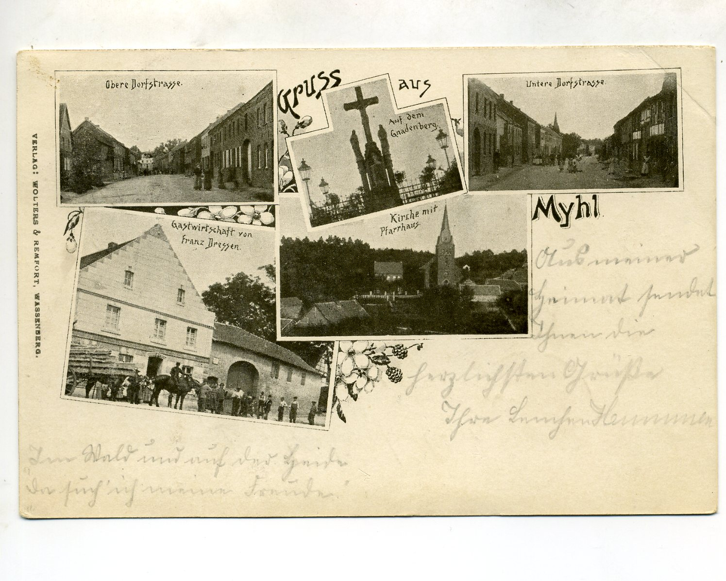 Gruss aus Myhl -1903 Obere Dorfstrasse -Auf dem Gnadenberg - Untere Dorfstrasse Gastwirtschaft von Frans Dressen -Kirche mit Pfarrhaus